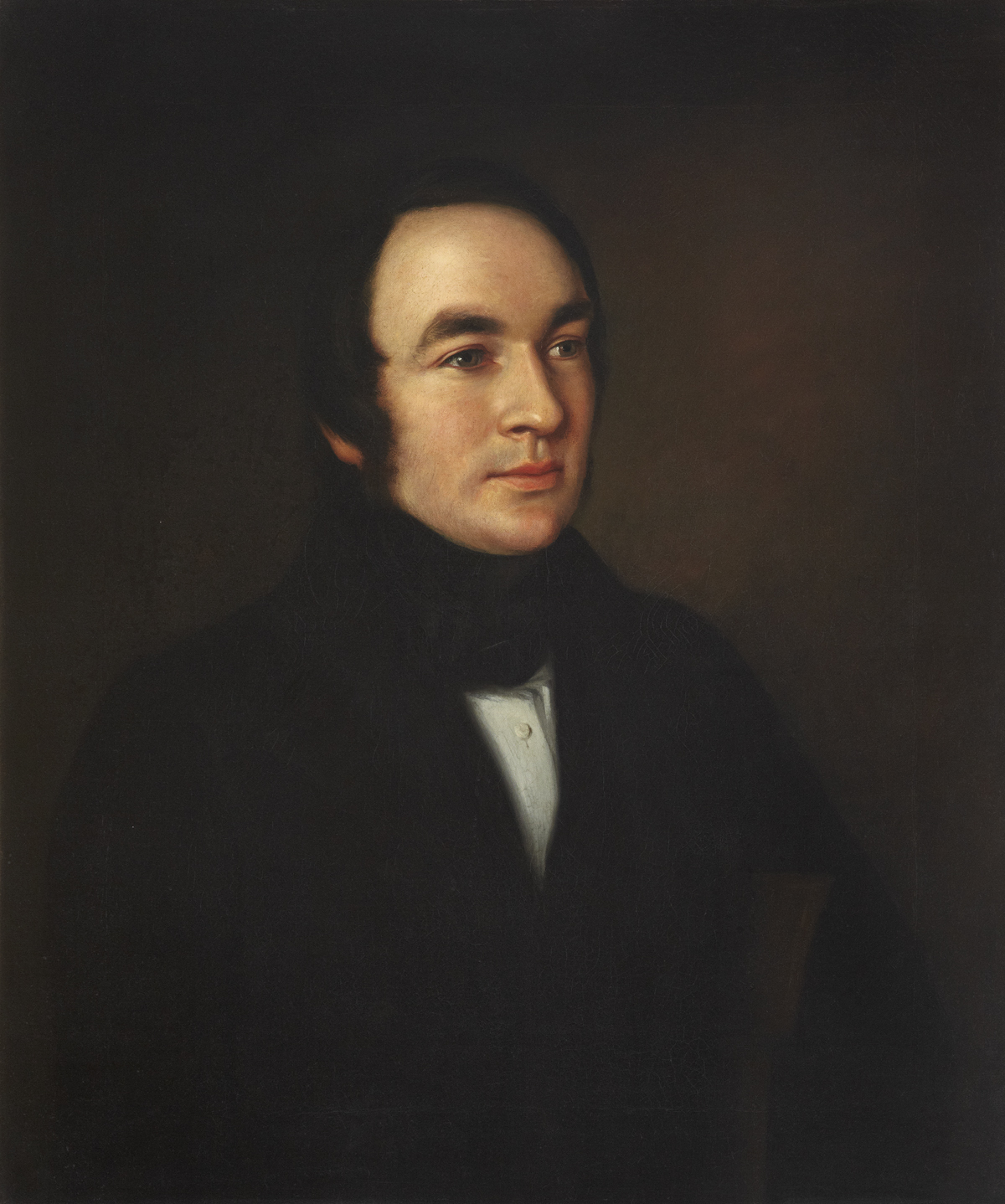 John Reid (1809–1849)